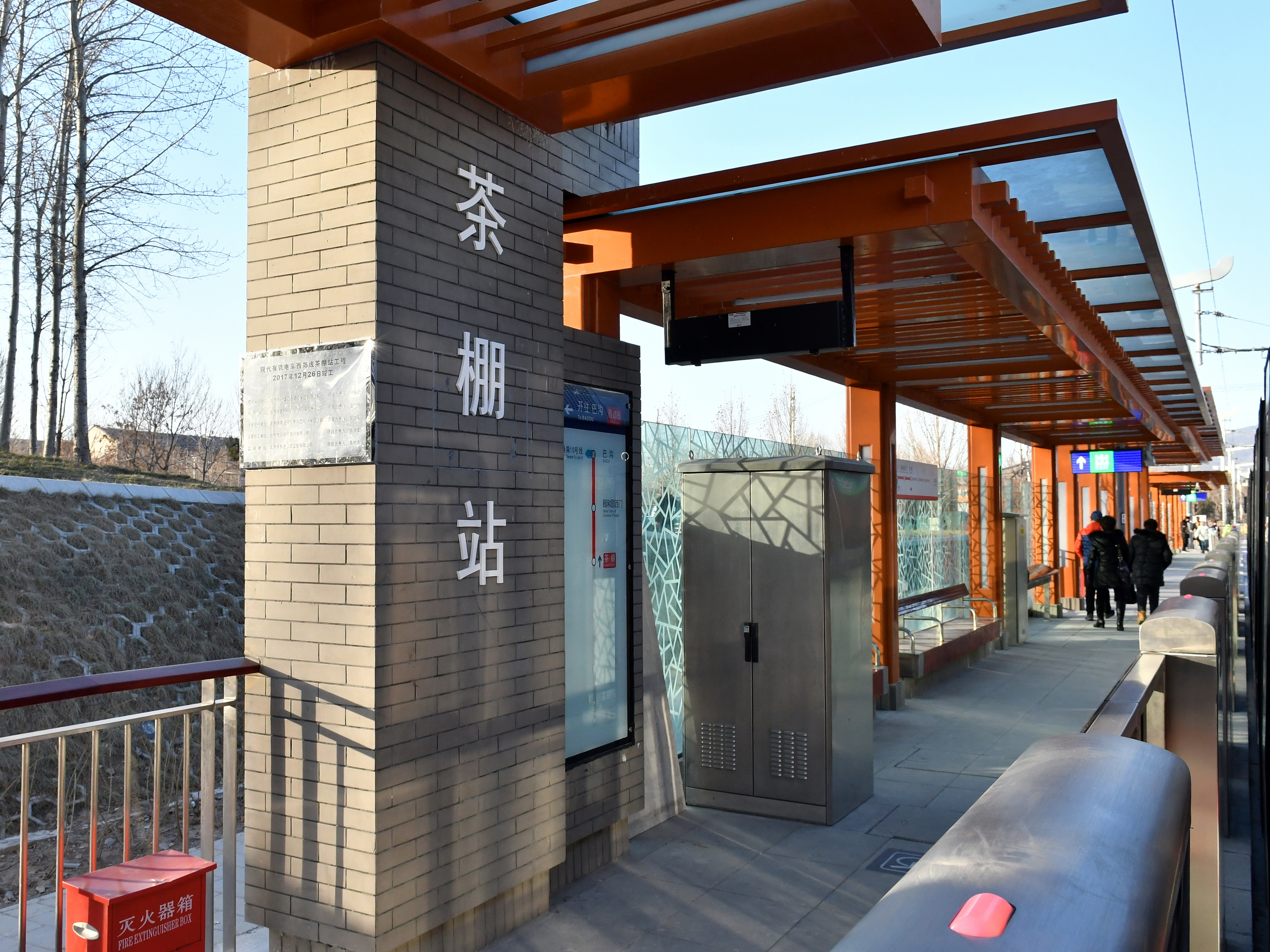 北京地铁西郊线茶棚站